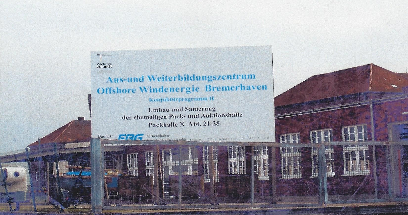 Bauschild an der ehemaligen Packhalle X im Fischereihafen Bremerhaven